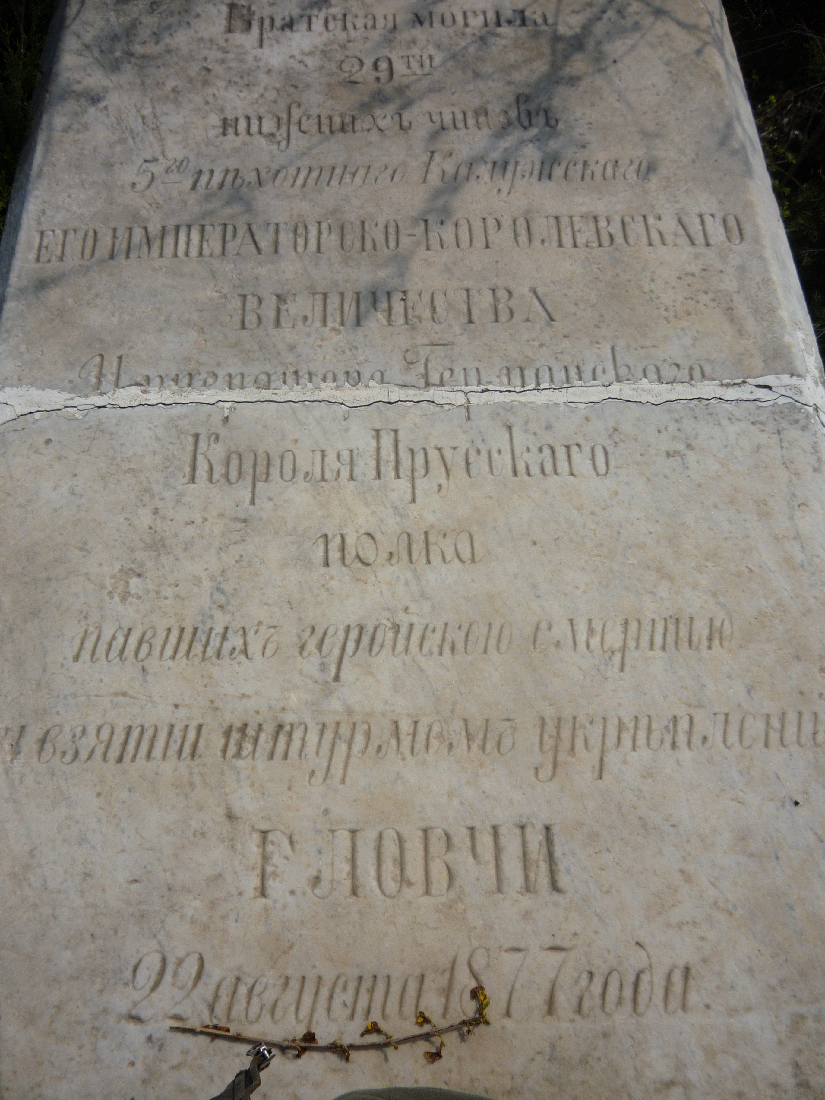 Паметник на 29 руски войници от 5-и пехотен Калужки полк, загинали на 22 август 1877 г. при освобождението на Ловеч от османско иго.